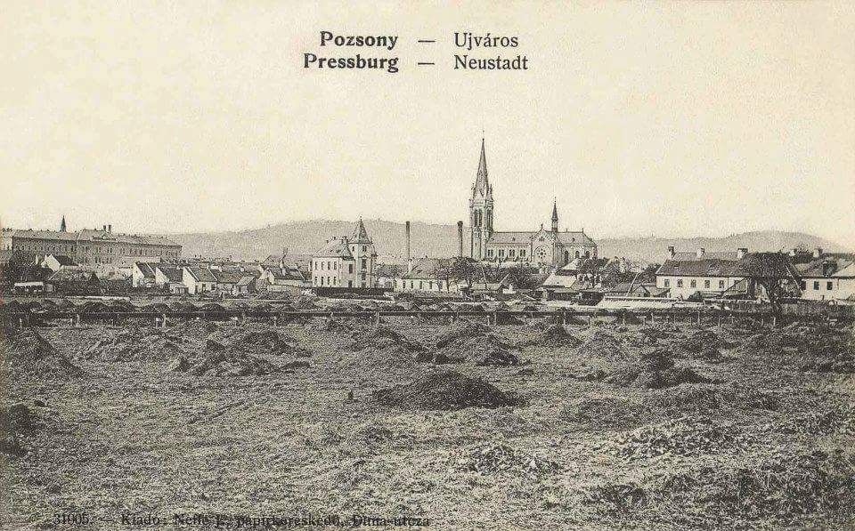 Das Blumenthal in der Gründerzeit um 1895; historische Ansichtskarte